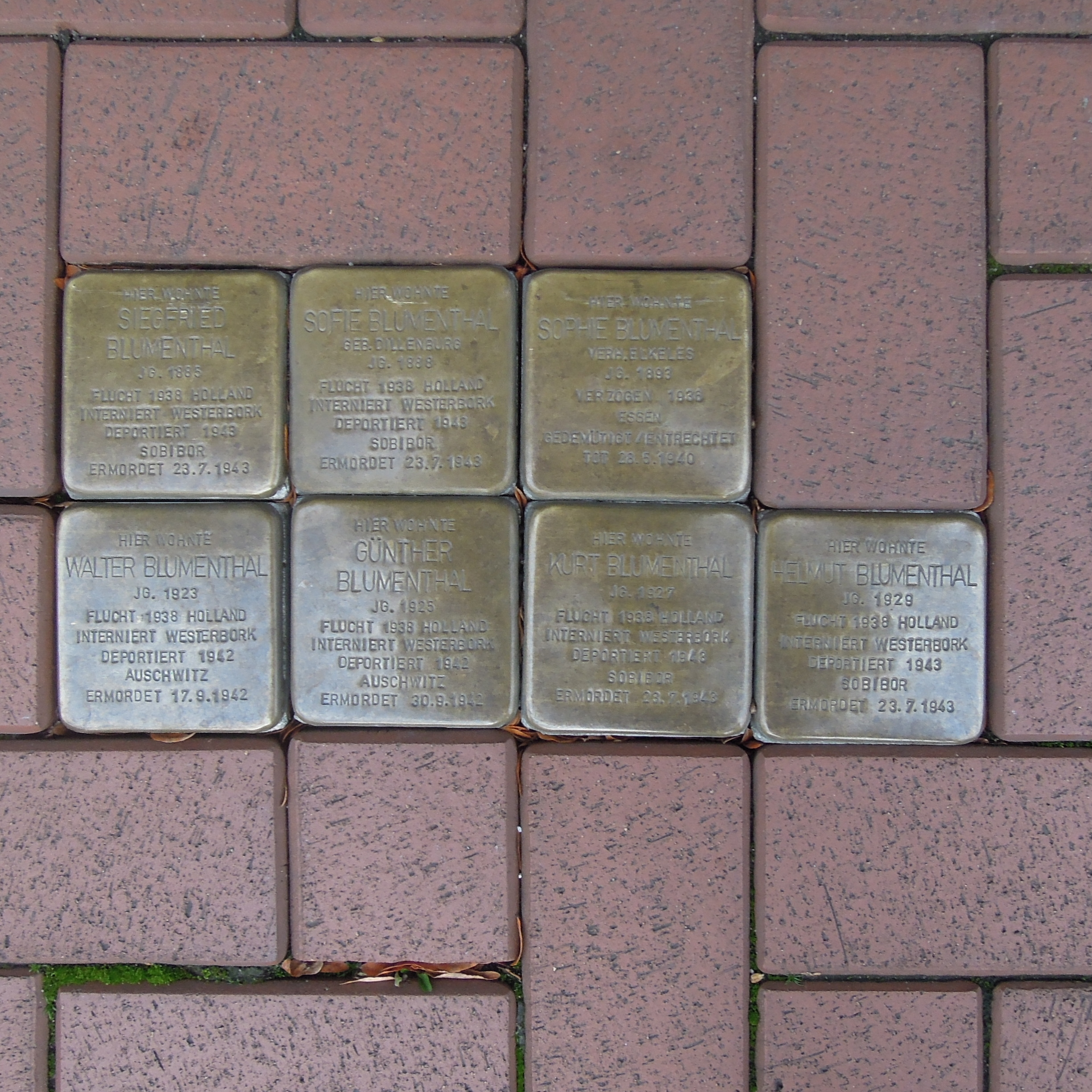 Stolpersteine Biesenkamp 6 in Castrop-Rauxel